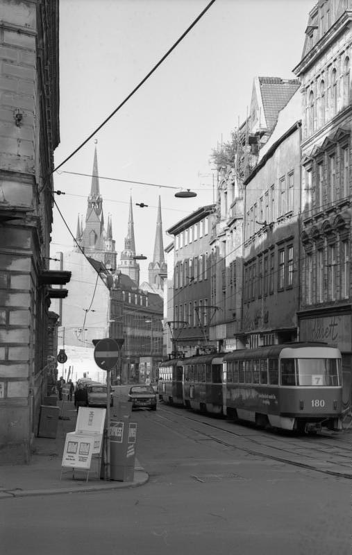 11.-18.8.1991 Bundesland Sachsen-Anhalt Halle